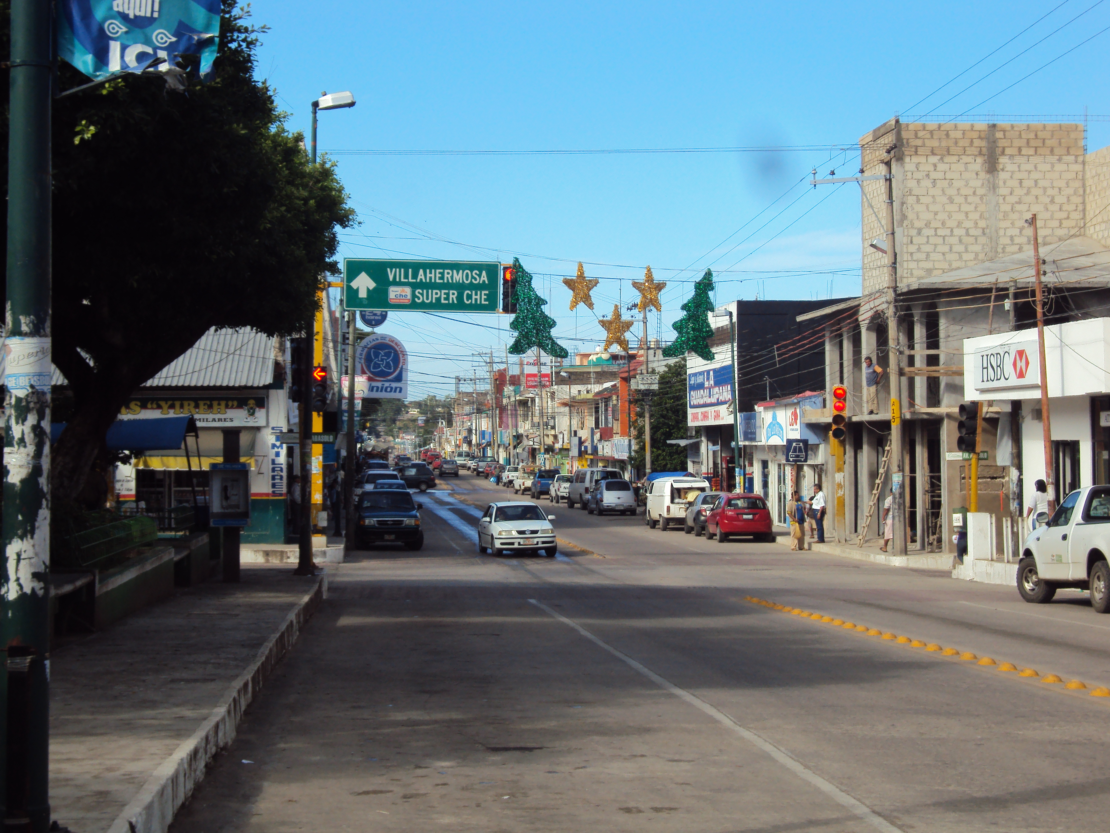 Ciudad de Emiliano Zapata, Tabasco